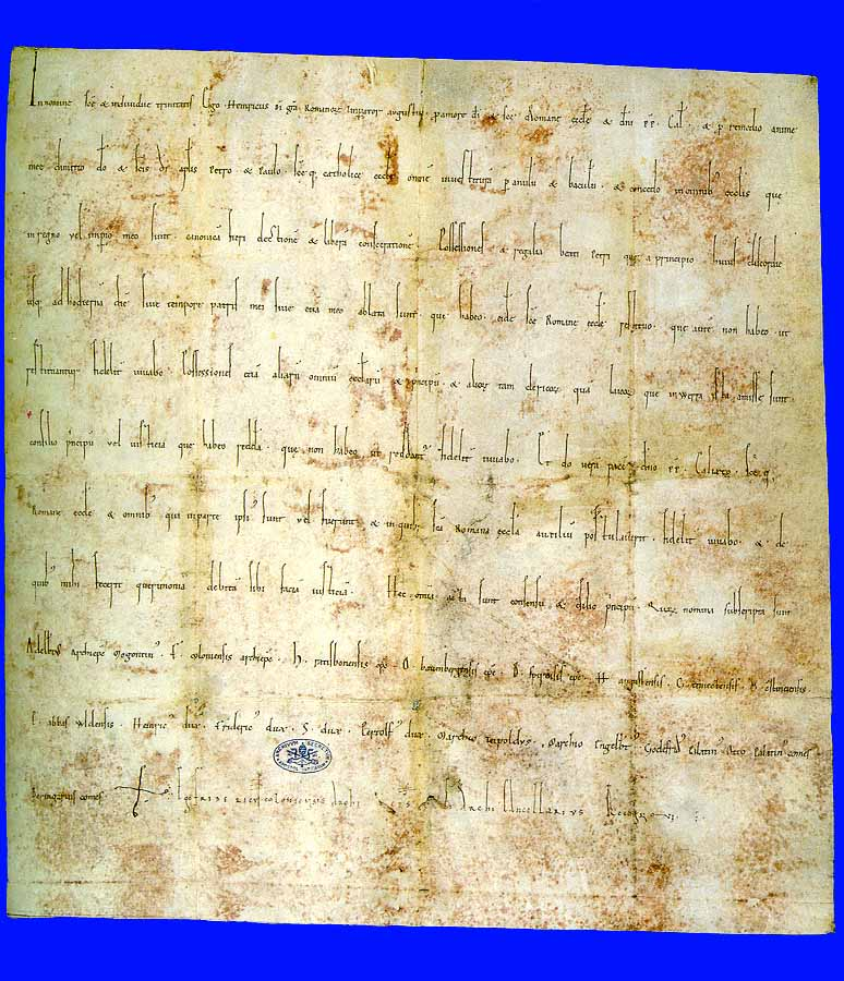 Das Wormser Konkordat, Vertrag zwischen dem deutschen Kaiser Heinrich V. und Papst Calixt II. zur Beilegung des Investiturstreits: In nomine sanctae et individuae Trinitatis. Ego Heinricus, Dei gratia Romanorum imperator augustus, pro amore Dei et Sanctae Romanae Ecclesiae et domini papae Calixti et pro remedio animae meae dimitto Deo et sanctis Dei apostolis Petro et Paulo Sanctaeque Catholicae Ecclesiae omnem investituram per anulum et baculum et concedo in omnibus ecclesiis, quae in regno vel imperio meo sunt, canonicam fieri electionem ac liberam consecrationem. Possessiones et regalia beati Petri, quae a principio huius discordiae usque ad hodiernam diem, sive tempore patris mei sive etiam meo, ablata sunt, quae habeo, eidem Sanctae Romanae Ecclesiae restituo; quae autem non habeo, ut restituantur fideliter iuvabo. Possessiones etiam aliarum omnium ecclesiarum et principum et aliorum tam clericorum quam laicorum, quae in werra ista amissae sunt, consilio principum vel iusticia quae habeo reddam; quae non habeo, ut reddantur fideliter iuvabo. Et do veram pacem domino papae Calixto Sanctaeque Romanae Ecclesiae et omnibus, qui in parte ipsius sunt vel fuerunt; et in quibus Sancta Romana Ecclesia auxilium postulaverit, fideliter iuvabo et, de quibus mihi fecerit querimoniam, debitam sibi faciam iusticiam. Haec omnia acta sunt consensu et consilio principum, quorum nomina subscripta sunt: Adalbertus archiepiscopus Mogontinus, F. Coloniensis archiepiscopus, H. Ratisbonensis episcopus, O. Bauenbergensis episcopus, B. Spirensis episcopus, H. Augustensis, G. Traiectensis, Ö. Constanciensis, E. abbas Wldensis, Heinricus dux, Fridericus dux, S. dux, Pertolfus dux, marchio Teipoldus, marchio Engelbertus, Godefridus palatinus, Otto palatinus comes, Beringarius comes. (SR) EGO FRIDERICUS COLONIENSIS ARCHIEPISCOPUS ET ARCHICANCELLARIUS RECOGNOVI